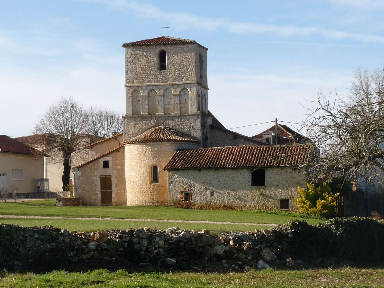 église d'Hautefaye, Dordogne, France; vue du nord-est